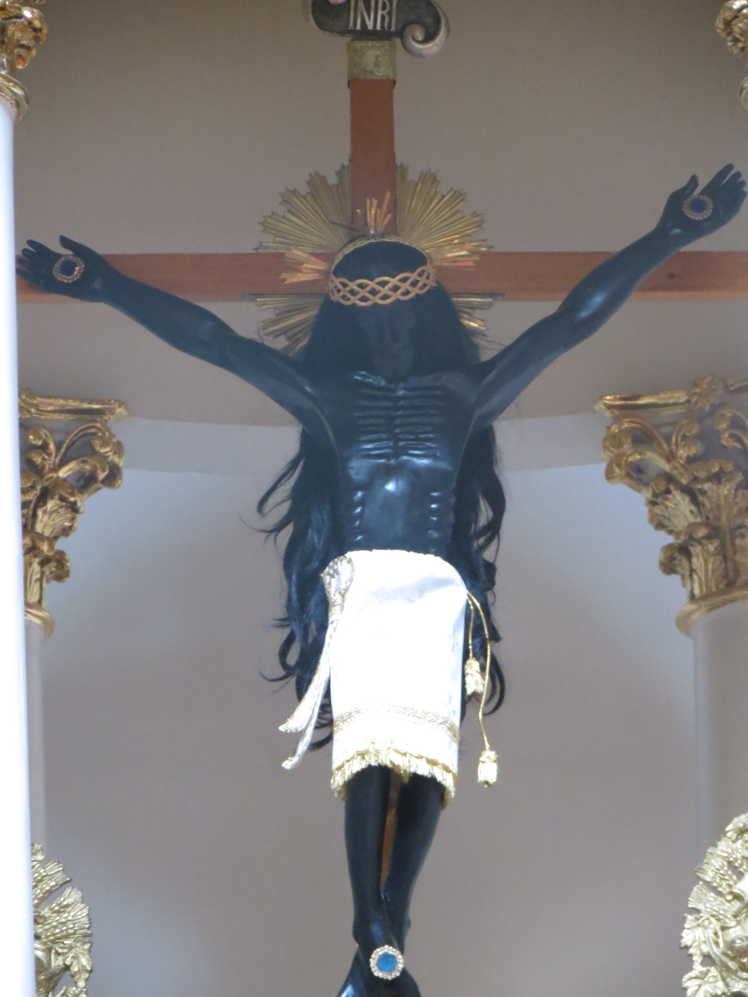 Señor del Encino, Aguascalientes